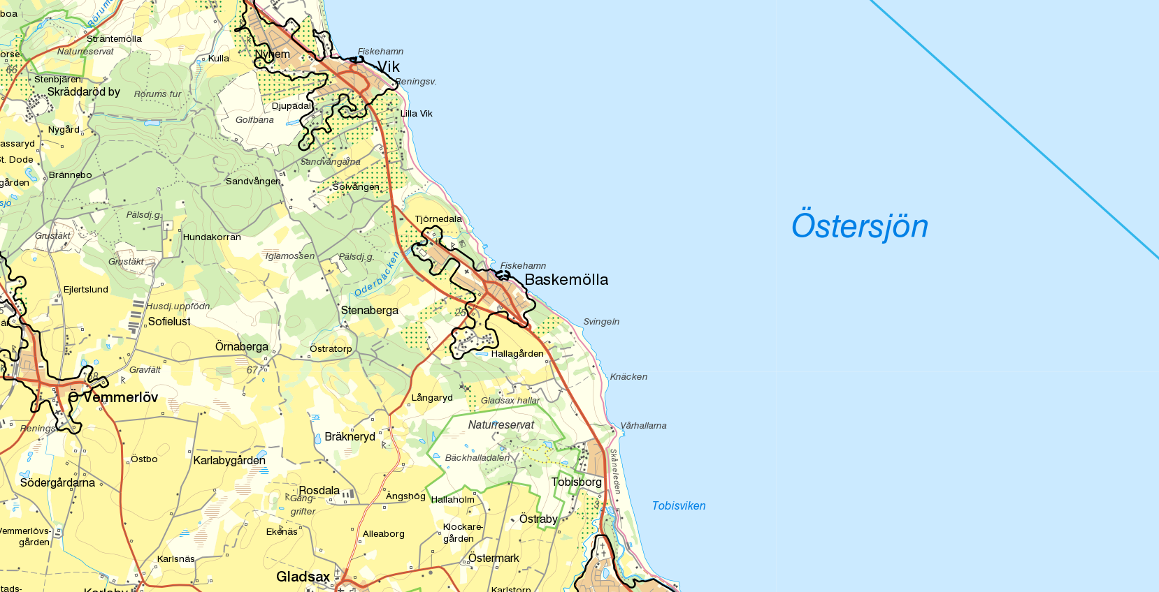 Tätorten Baskemölla med gränserna från Statistiska centralbyråns tätortsavgränsning 2015 i svart. Bakgrundskarta från Lantmäteriet, skala 1:30 236.